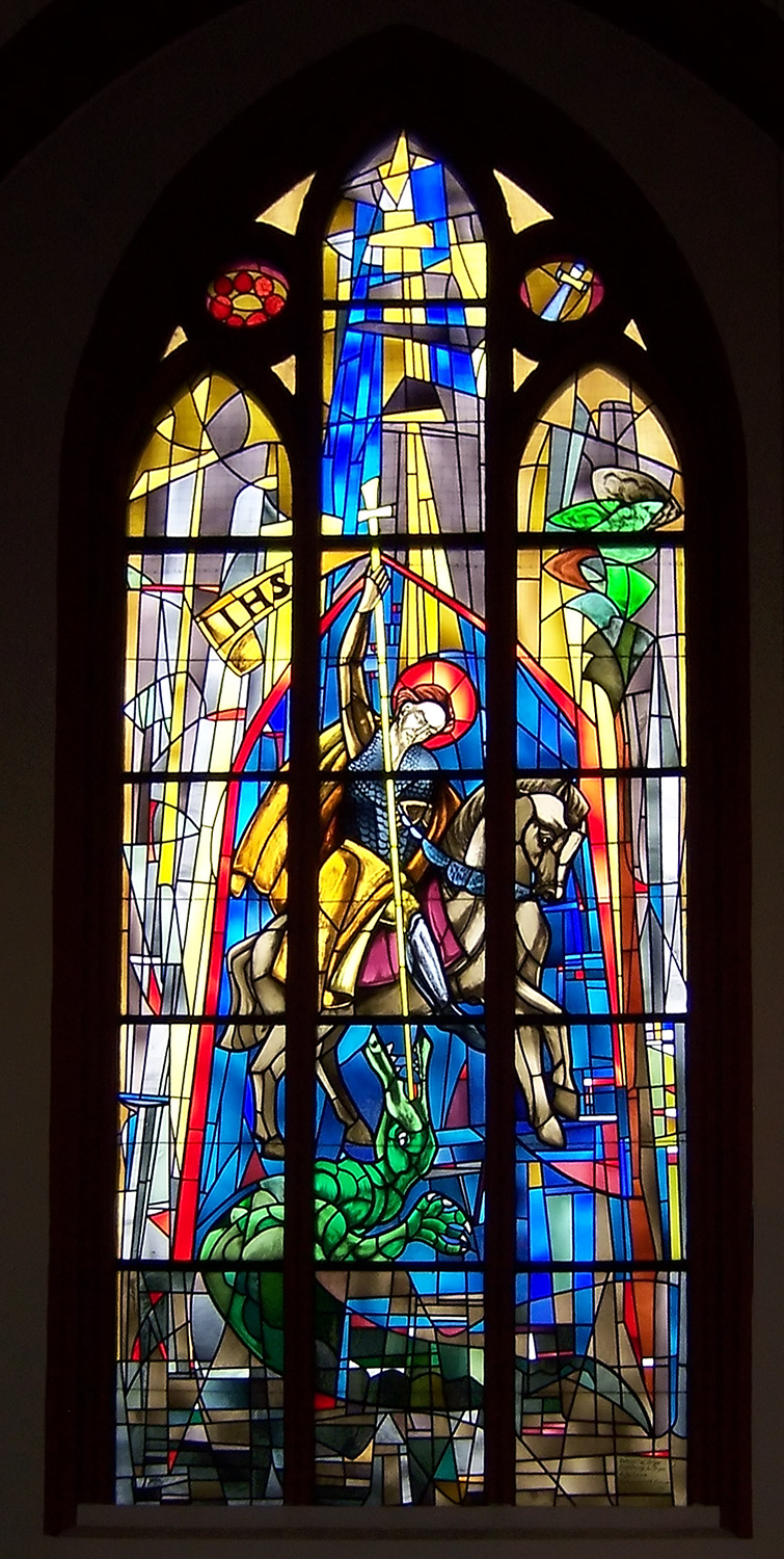 St. Georgs-Kirche in Bremen- Huchting. Entwurf der Fensterbilder: Will Torger (Bremen), Ausführung: Will Torger und Meister Brückner, Glaswerkstätten K. Lenderoth (Bremen), 1965-67. Bezeichnung: St. Georgsfenster